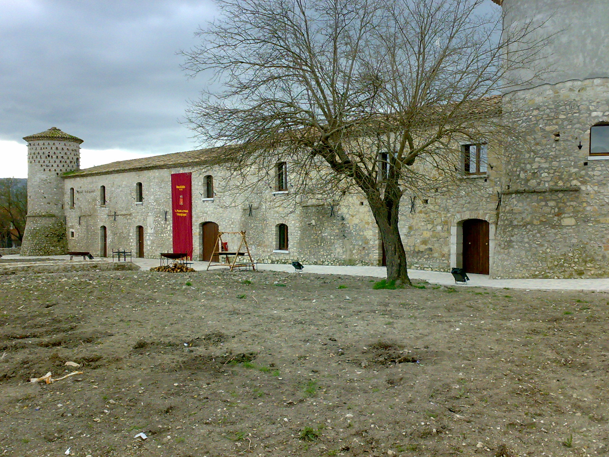 DOGANA ARAGONESE - FLUMERI (AV)